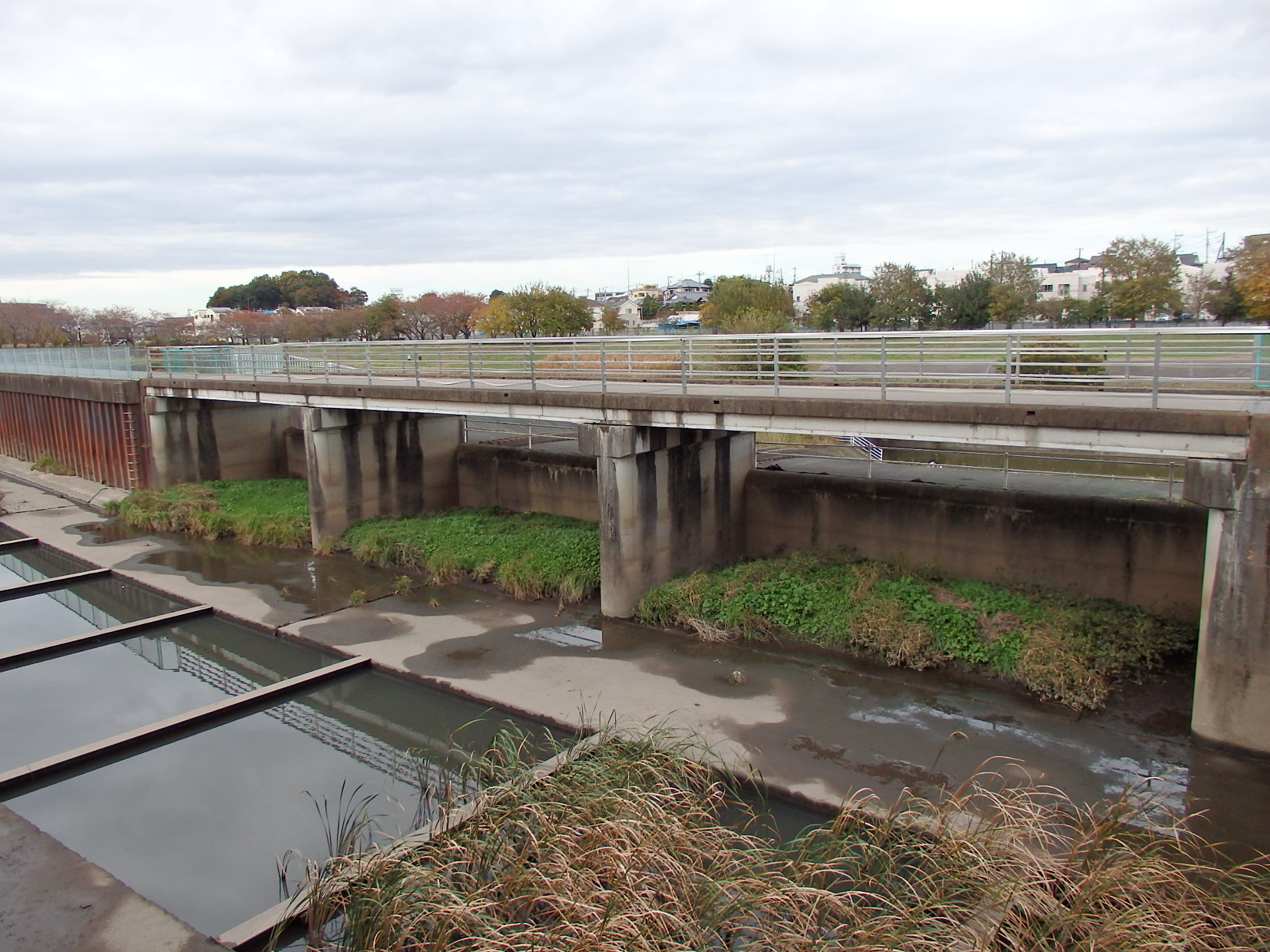 上谷沼調節池越流堤